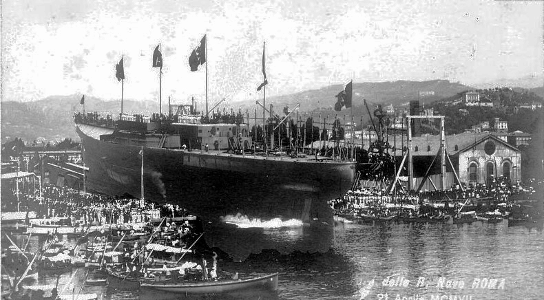 Il momento del battesimo dell'acqua della nave da battaglia Roma il 21 aprile 1907 nel Regio Arsenale di Spezia.